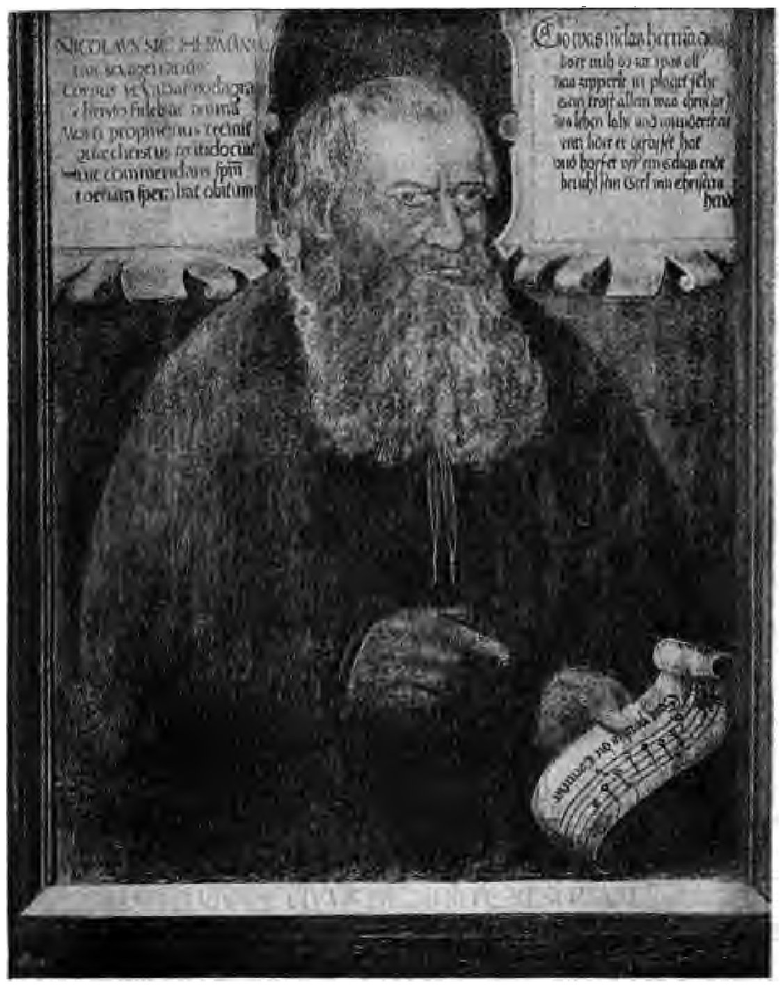 Nicolaus Herman: Die Sonntags-Evangelia (1561). Bibliothek Deutscher Schriftsteller aus Böhmen. Herausgegeben im Auftrage der Gesellschaft zur Förderung deutscher Wissenschaft, Kunst und Literatur in Böhmen. Band II. Prag, Wien, Leipzig.